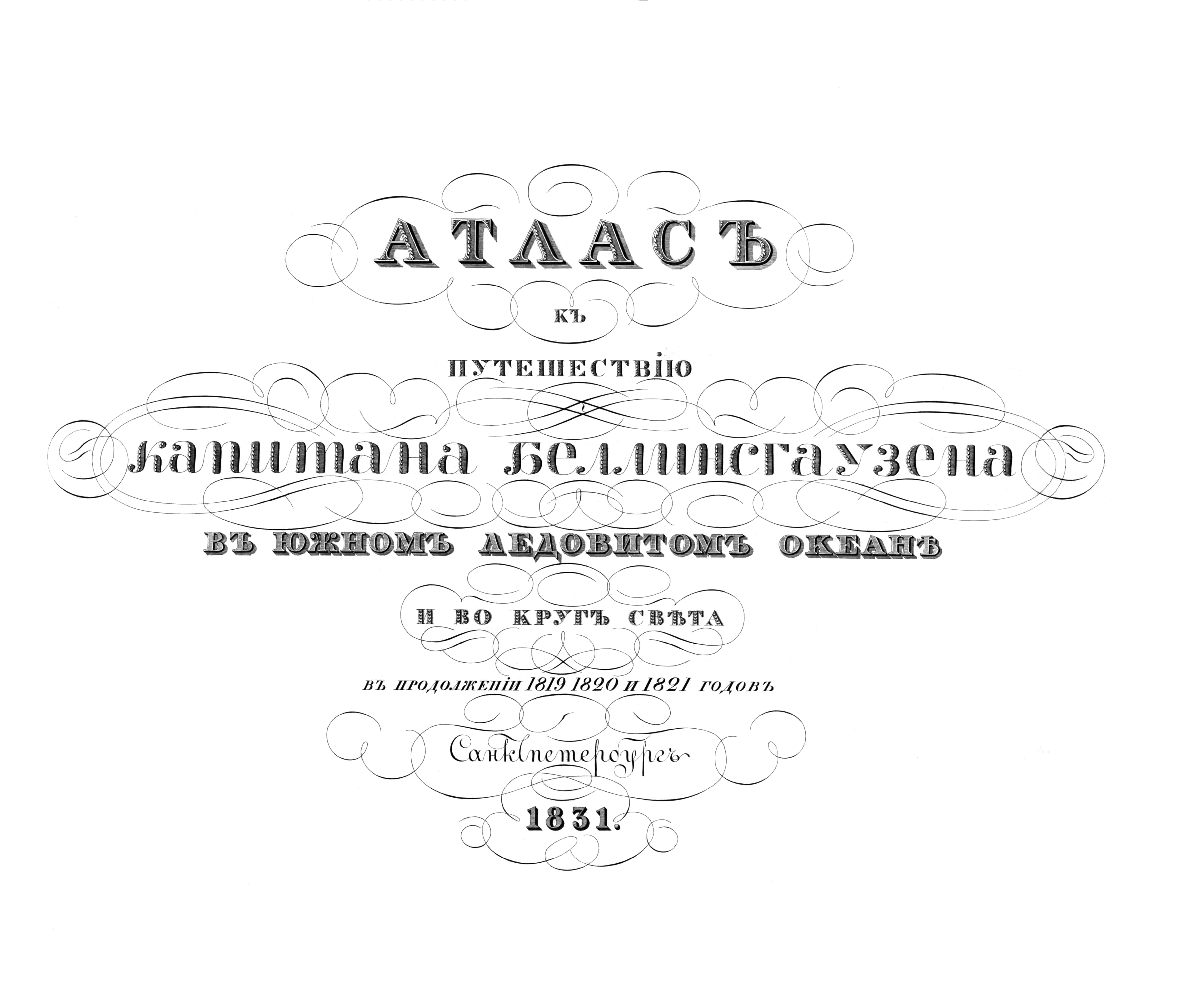 Титульный лист издания Атлас к путешествию капитана Беллинсгаузена в Южном Ледовитом океане и вокруг света в продолжении 1819, 1829 и 1821 годов. — Санктпетербург : [б. и.], 1831. — [4], 64 с.